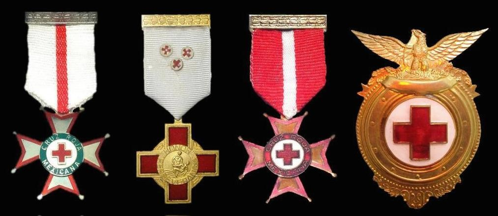 Distinciones otorgadas por la Cruz Roja Mexicana al arqueólogo Arturo Montero.